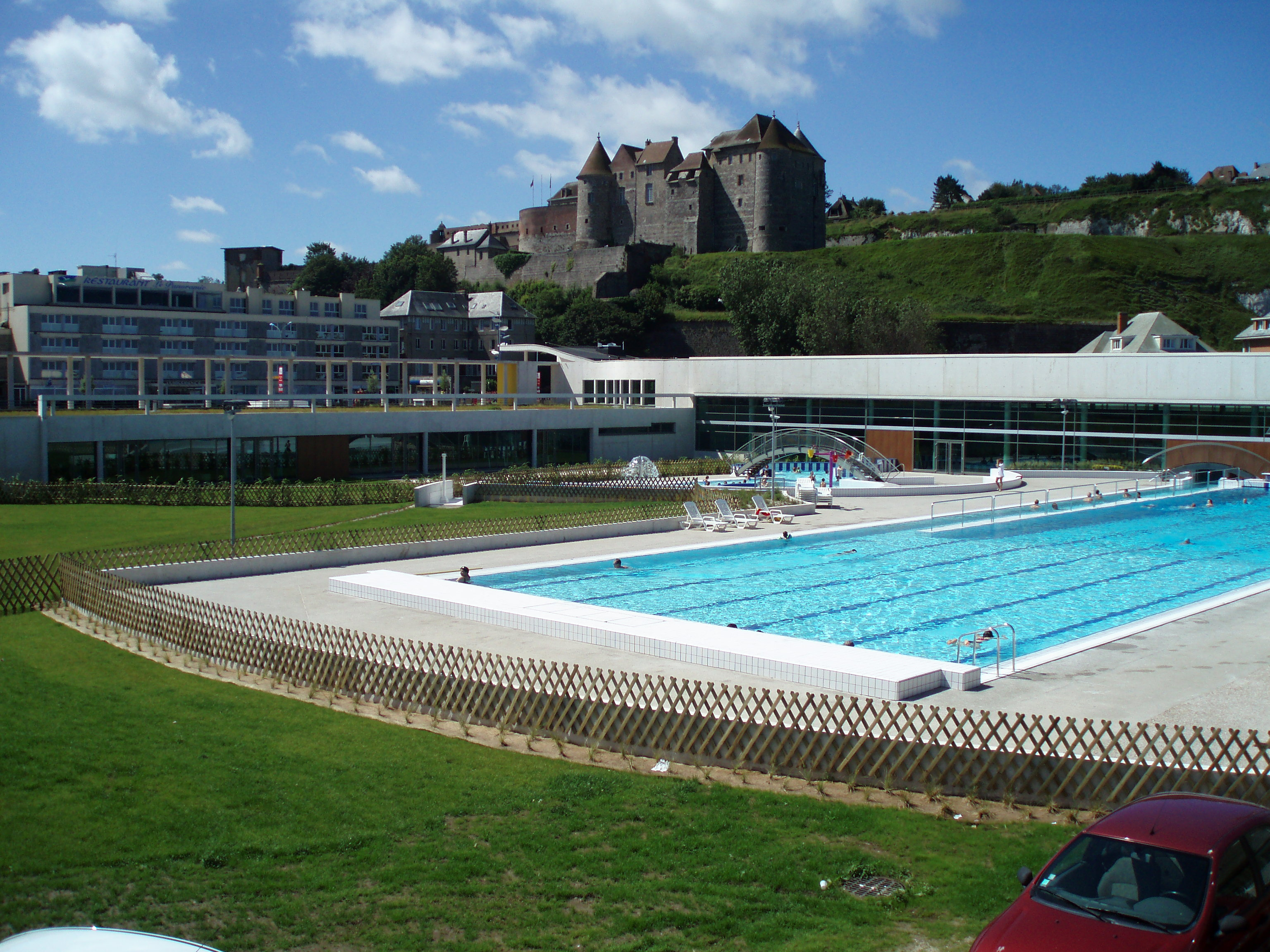 Chateau et station balnéaire de Dieppe (France)